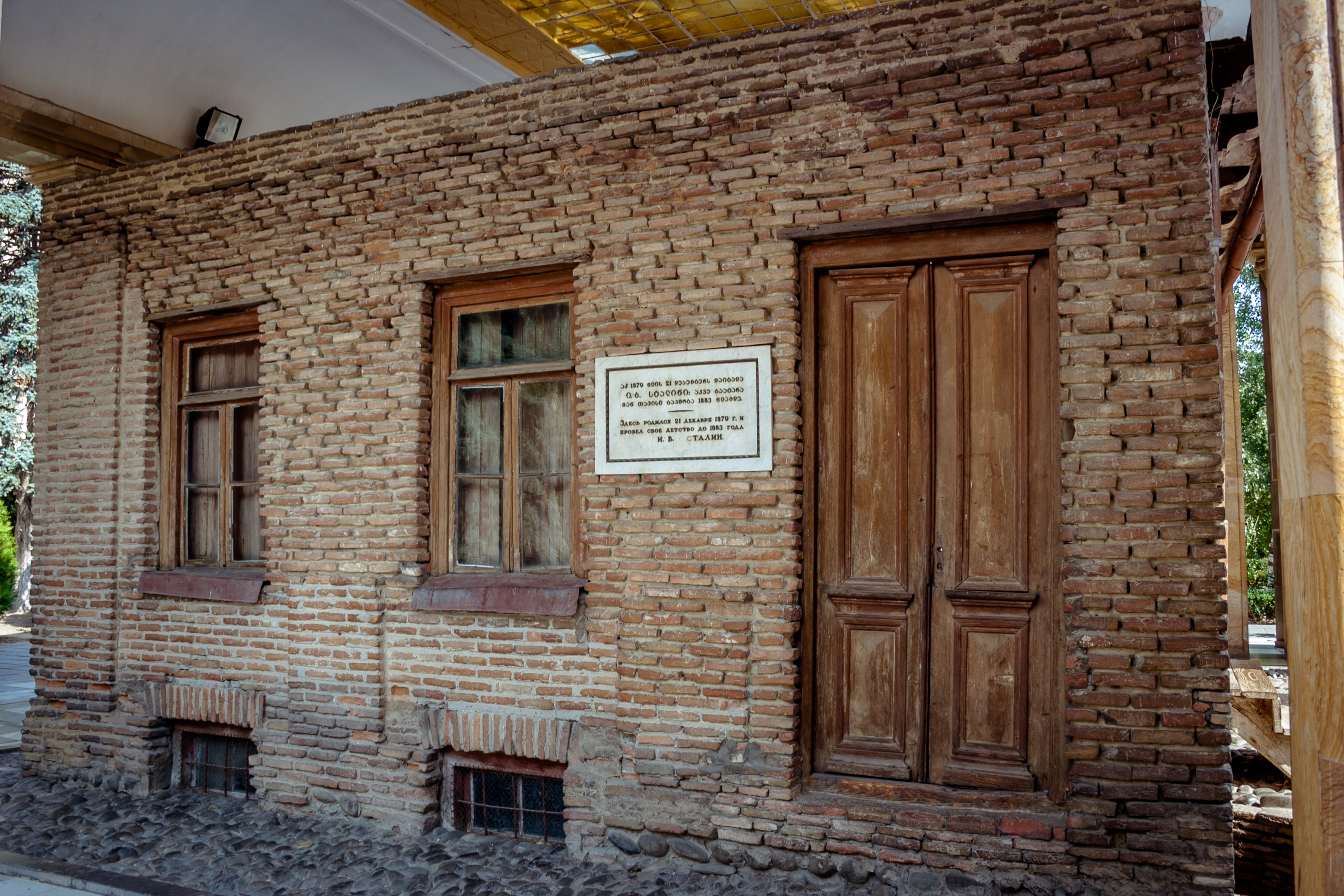 სტალინის სახლი